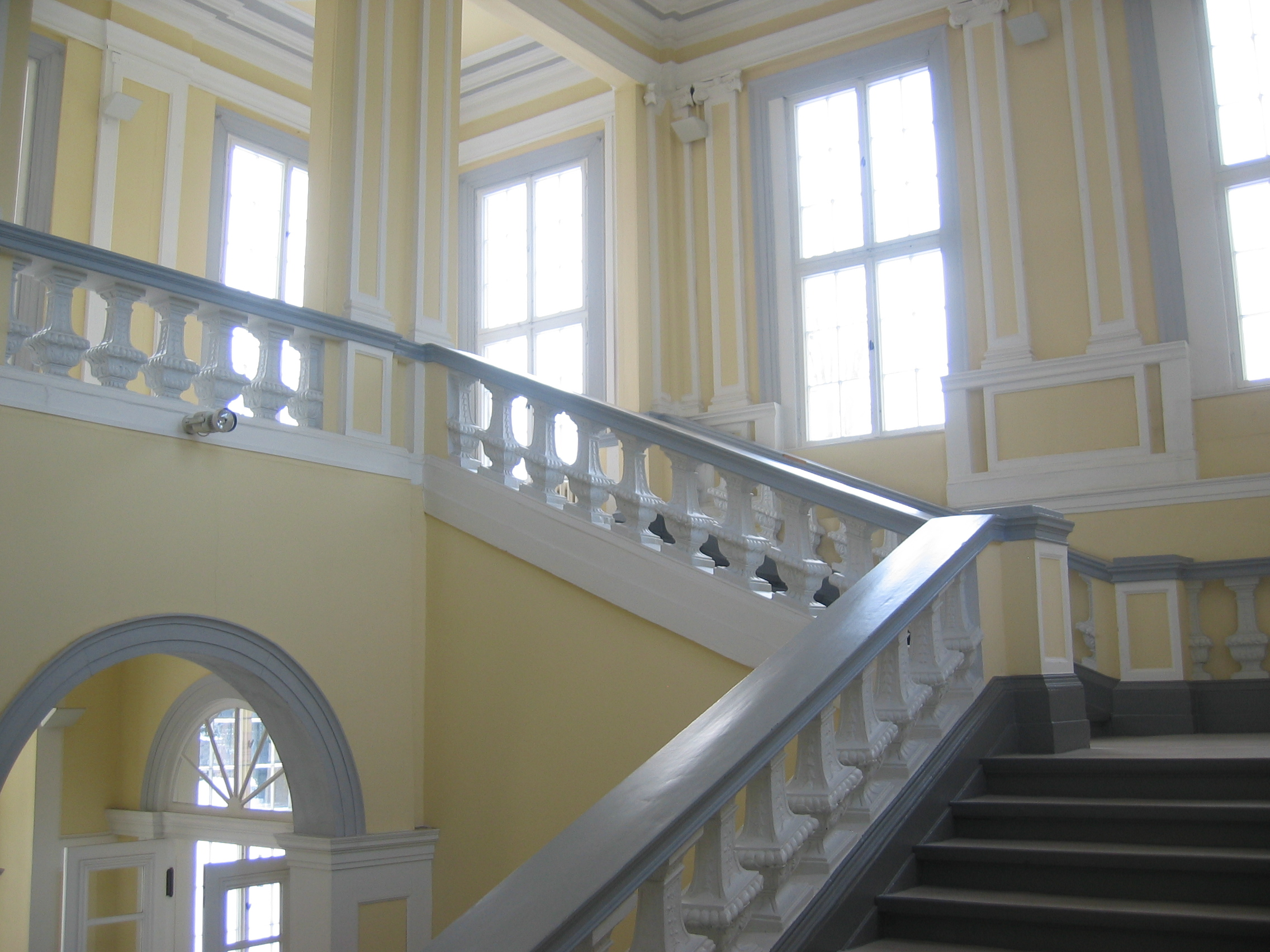 Treppenhaus im Nordflügel